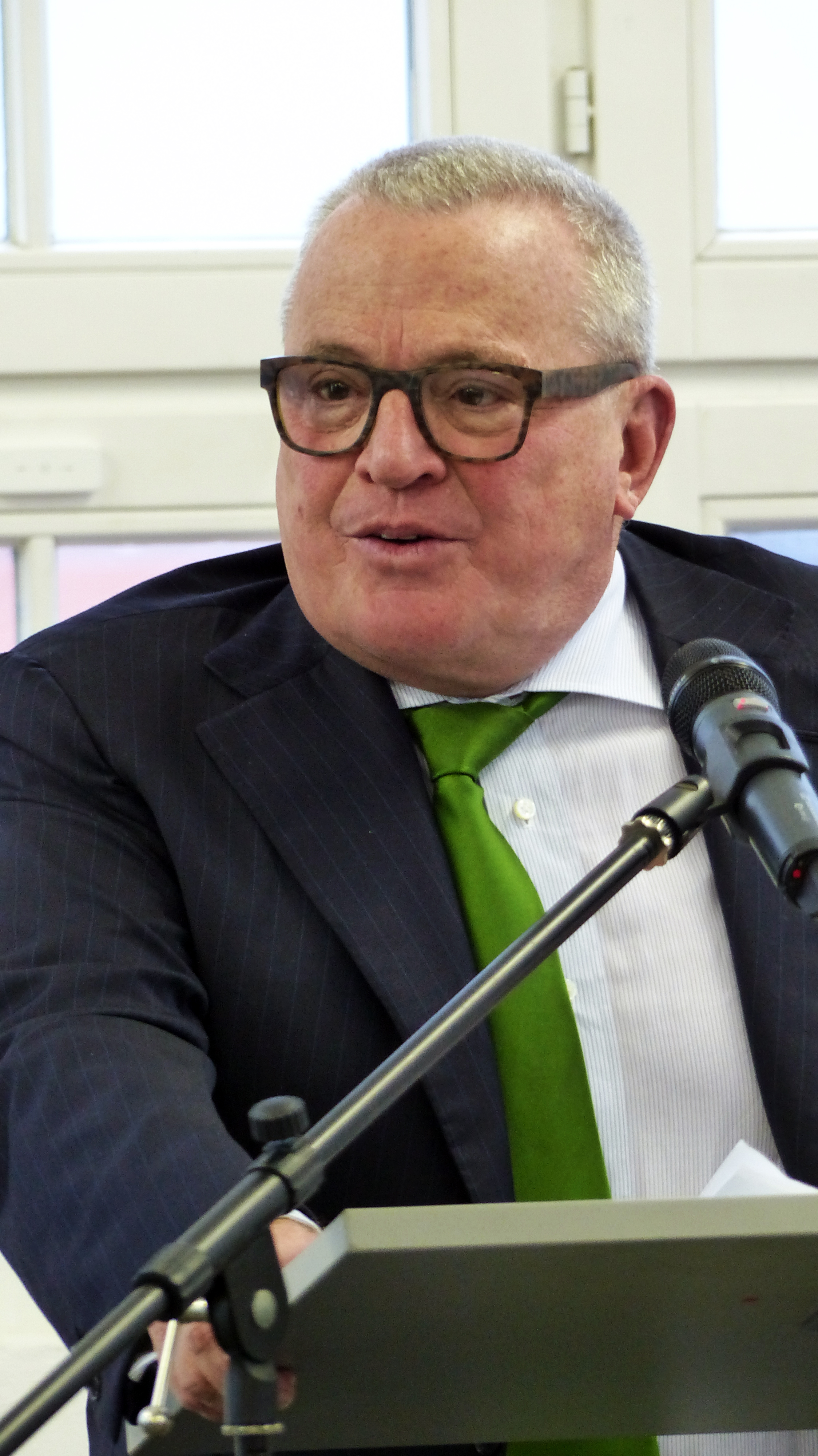 Preisverleihung im Rahmen der Wirtschaftsinitiative "MINT Zukunft schaffen" in Sachsen 2014 in den "Technischen Sammlungen Dresden" am 24.11.2014